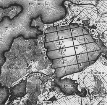 滋賀県湖東地方、干拓前の大中湖。